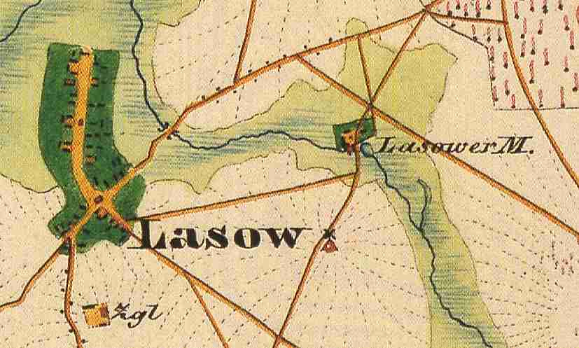 Laasow, Ortsteil der Gemeinde Spreewaldheide, Landkreis Dahme-Spreewald, Brandenburg, Deutschland, Ausschnitt aus dem Urmesstischblatt 4050 Straupitz von 1846